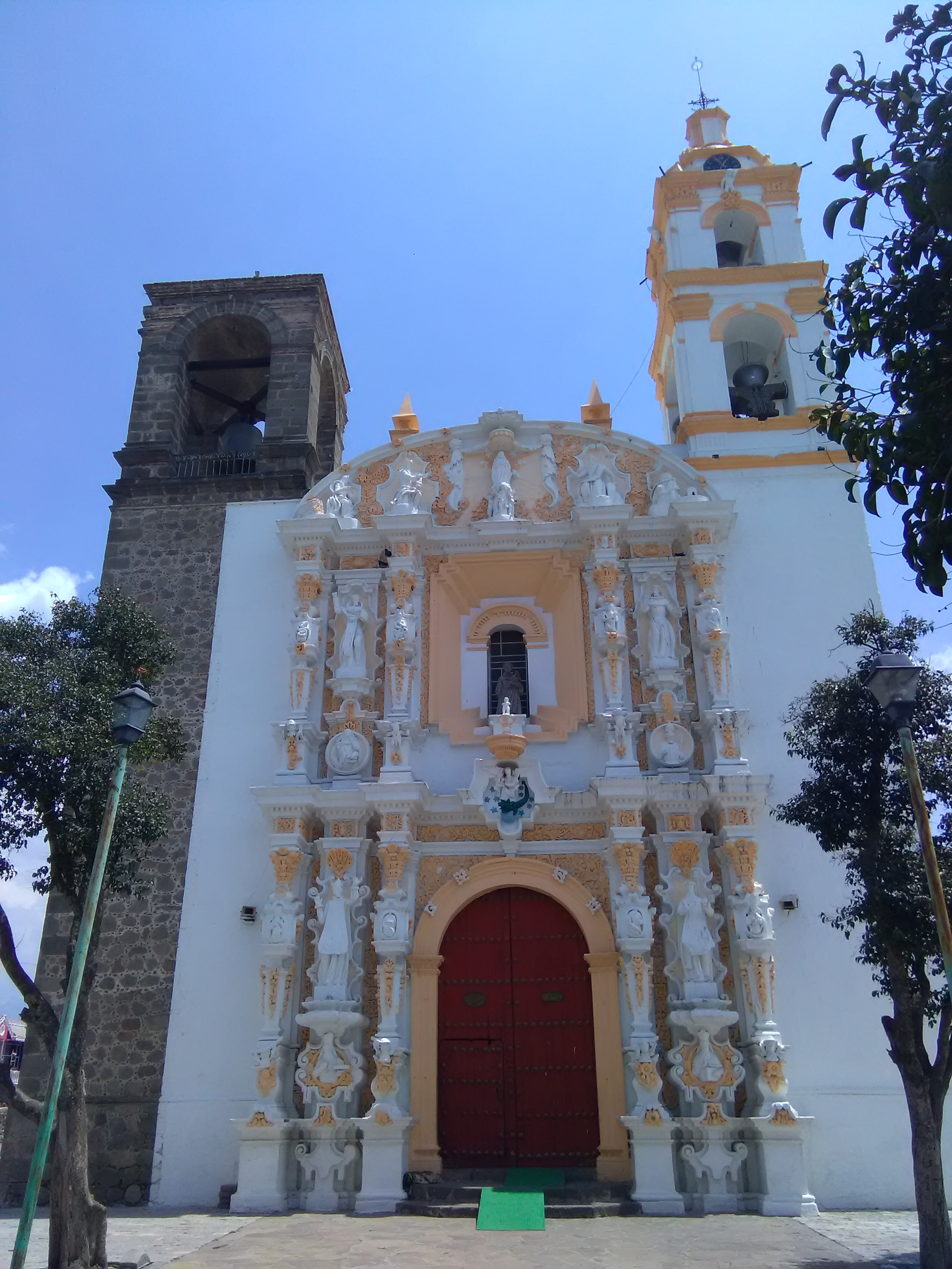 Iglesia de San Antonio, Acuamanala de Miguel Hidalgo, Tlaxcala